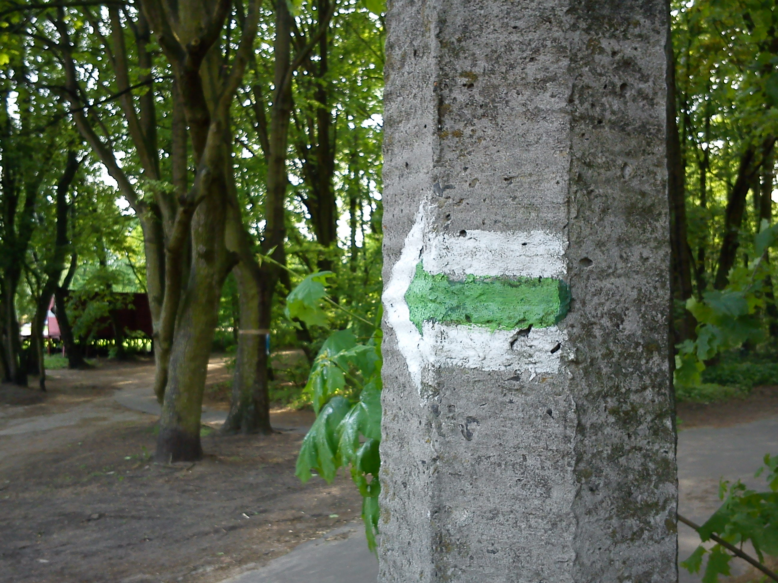 Szlak zielony na Golęcinie w Poznaniu (jez. Rusałka).